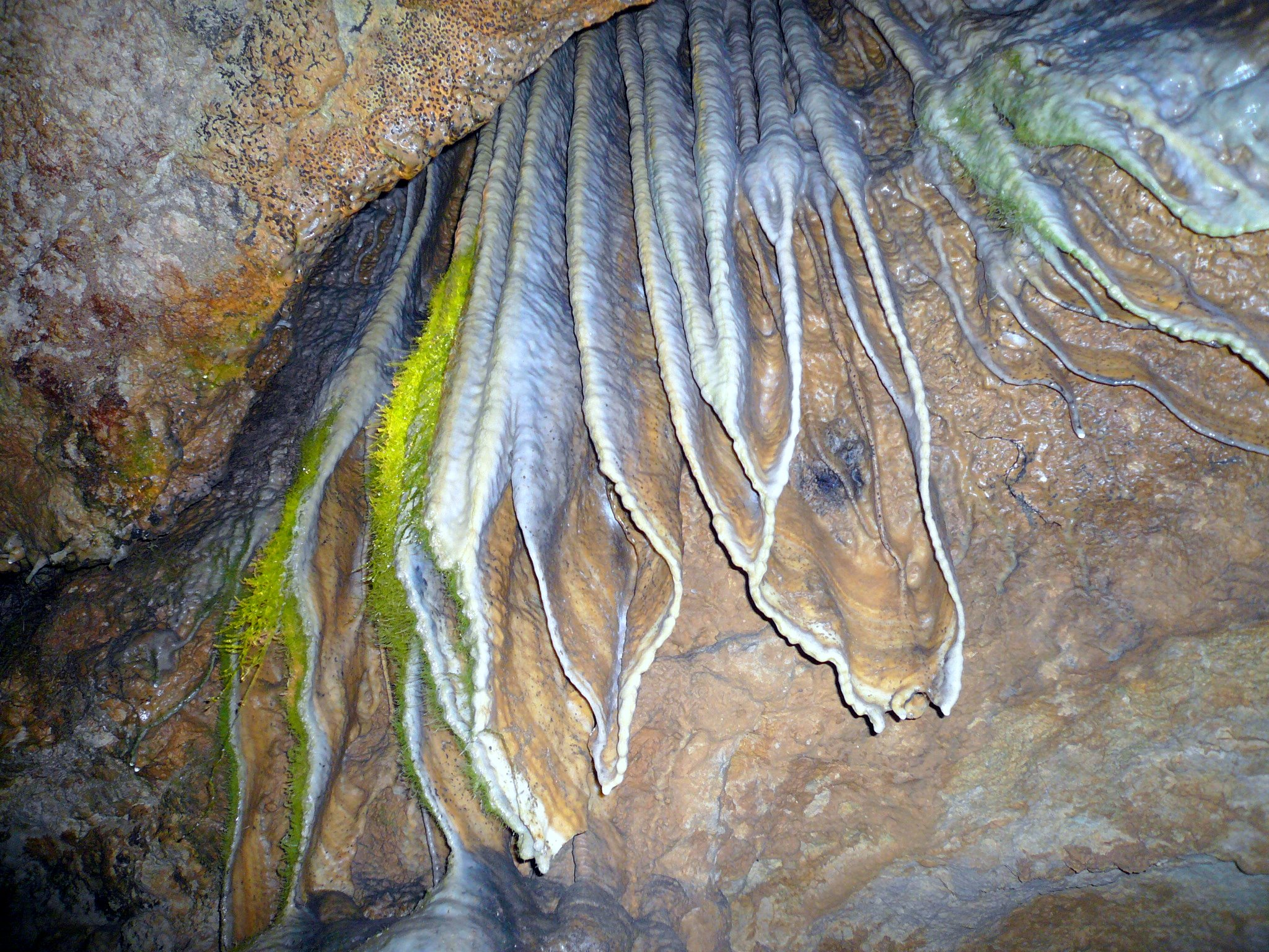 Sophienhöhle, Sinterfahne bemoost